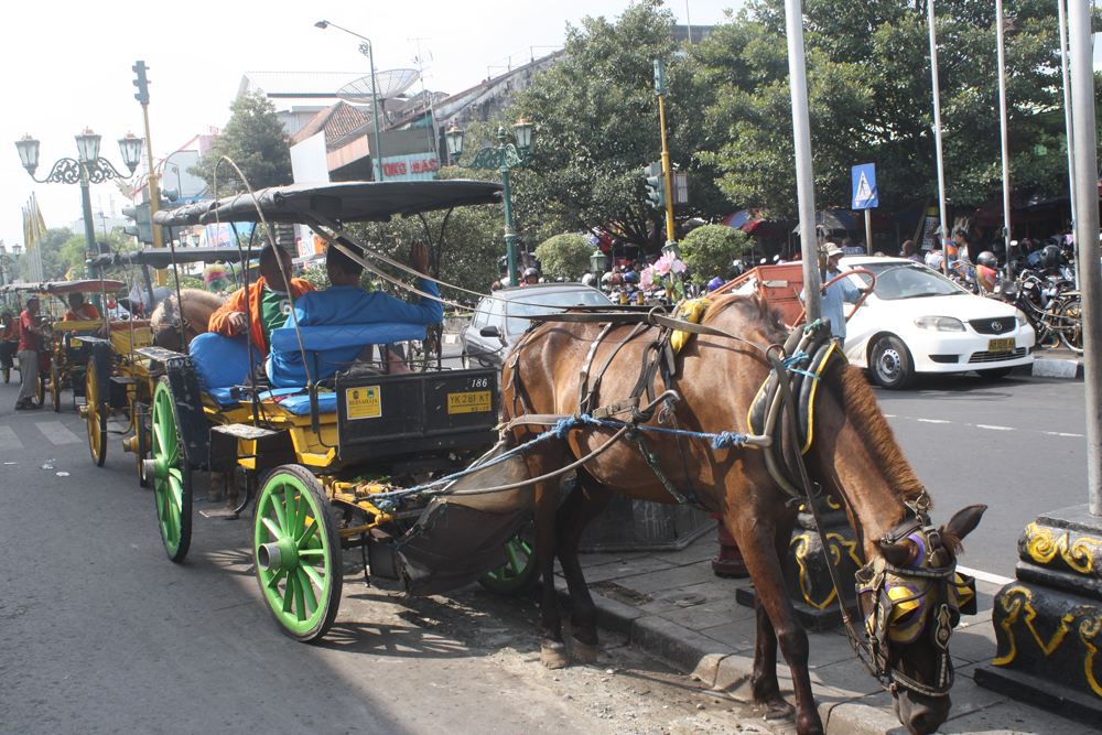 Dhokar yang ada di jalan malioboro Yogyakarta Jawa Tengah Indonesia